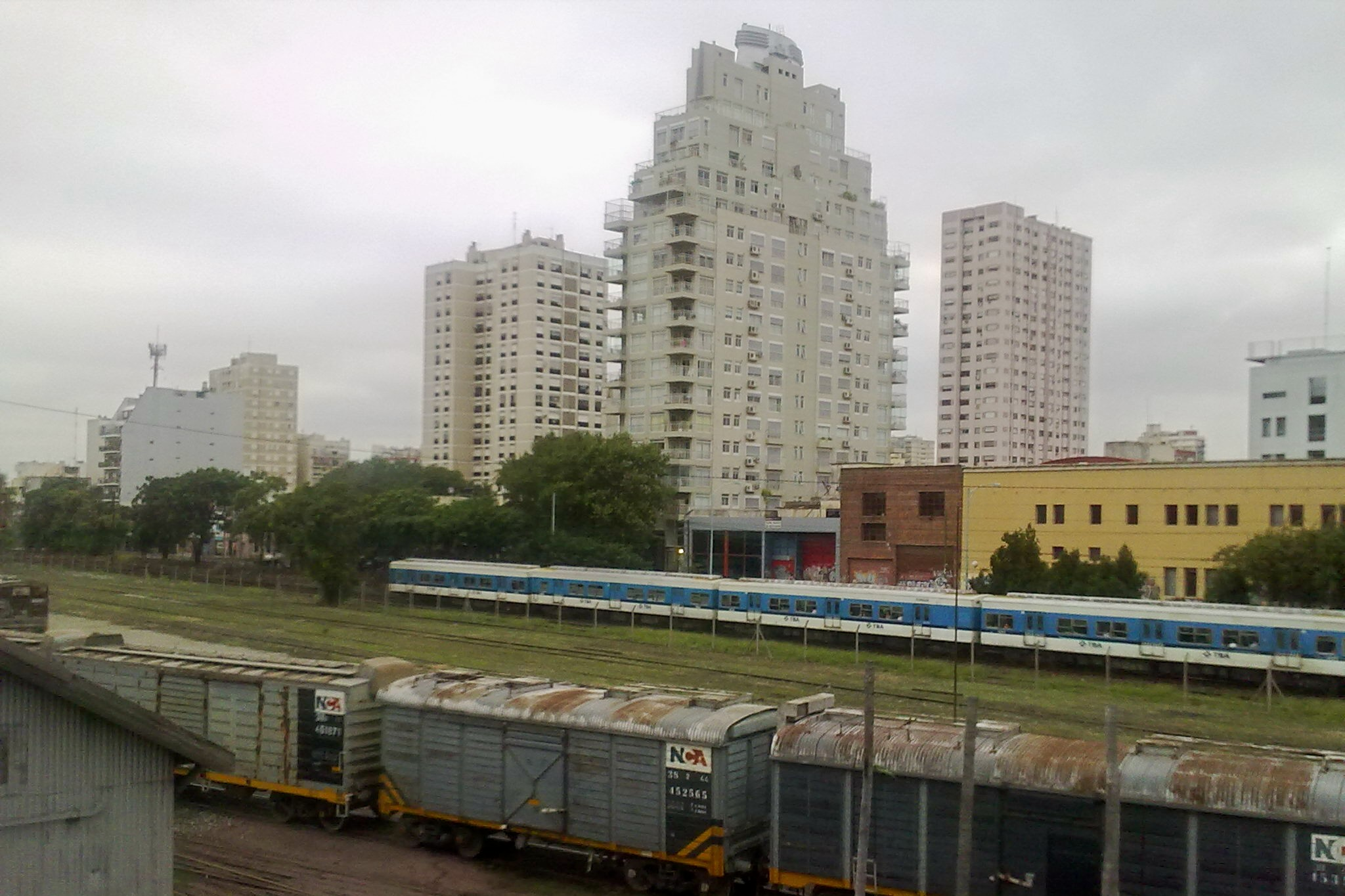 Green Tower (Gradel & Kopelioff, 2001-03); Av. Cramer 1092. Barrio de Colegiales, Buenos Aires, Argentina. Vías cercanas a la Estación Colegiales del tren Bartolomé Mitre